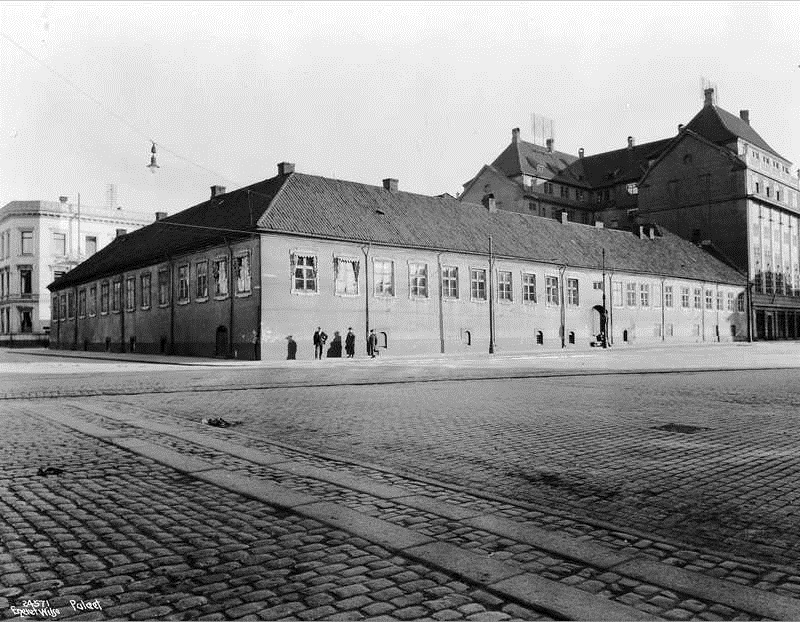 Paléet fotografert i juni 1924.